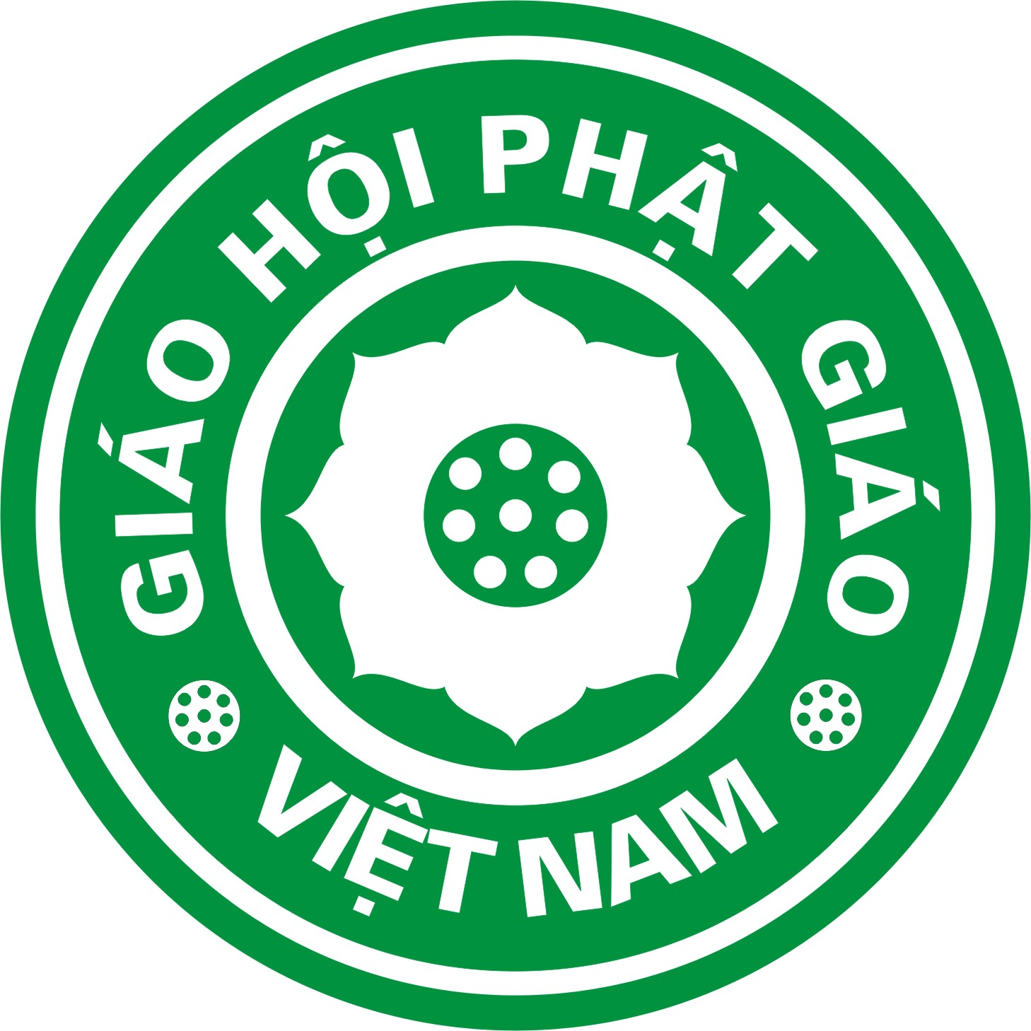 Huy hiệu chuẩn của Phật Giáo Hội Việt Nam được thông qua bằng văn bản_chương 1 điều 2,Hiến Chương GHPGVN./.